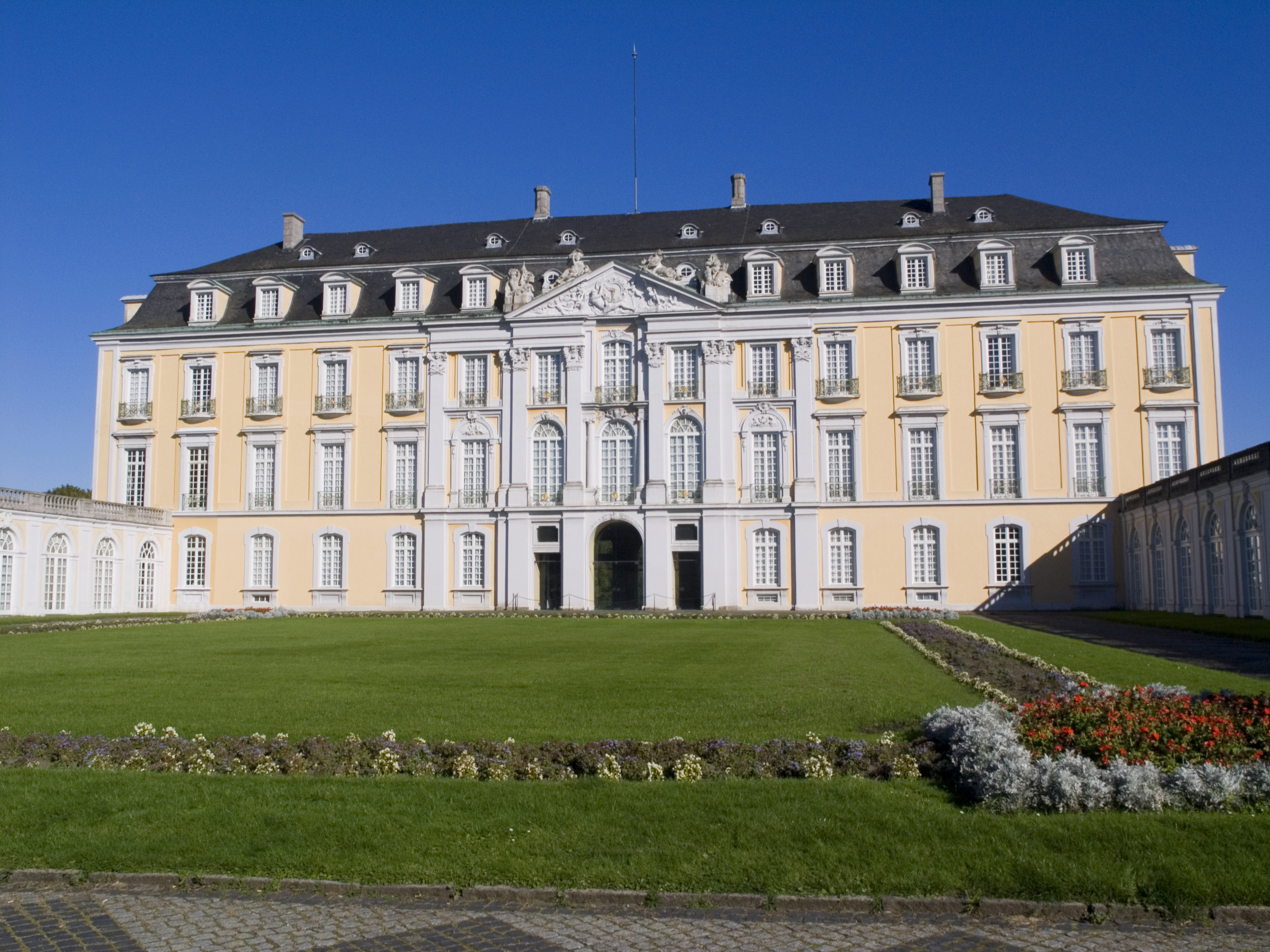 Северный фасад дворца Аугустусбург (Брюль, Северный Рейн-Вестфалия)